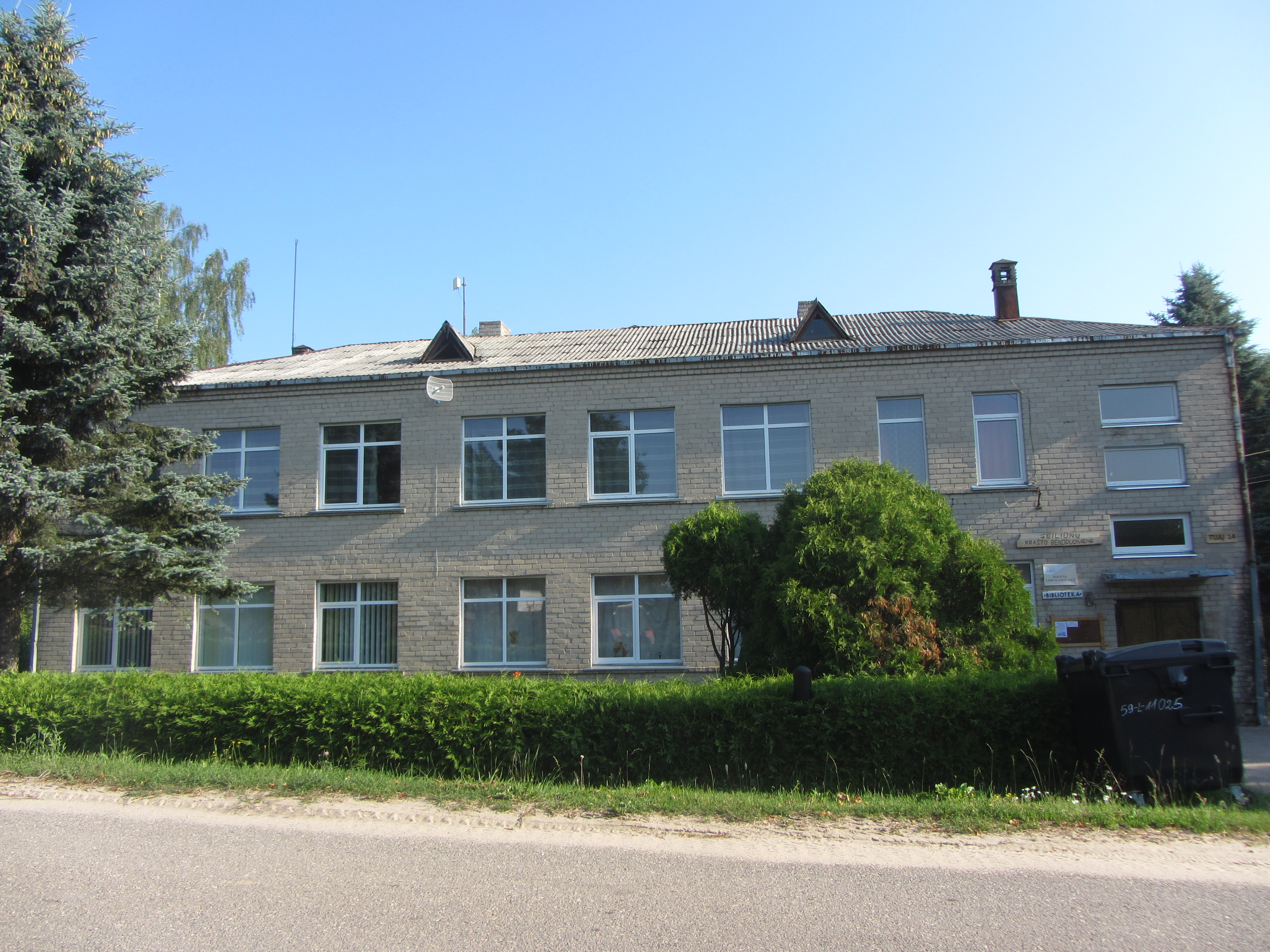 Seiliūnai 67224, Lithuania